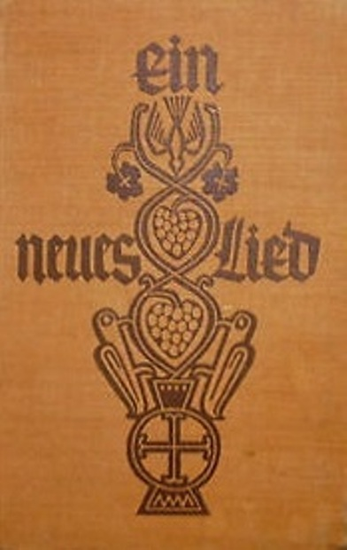 Otto Riethmüller: Ein neues Lied. Ein Liederbuch für die deutsche evangelische Jugend. 1932